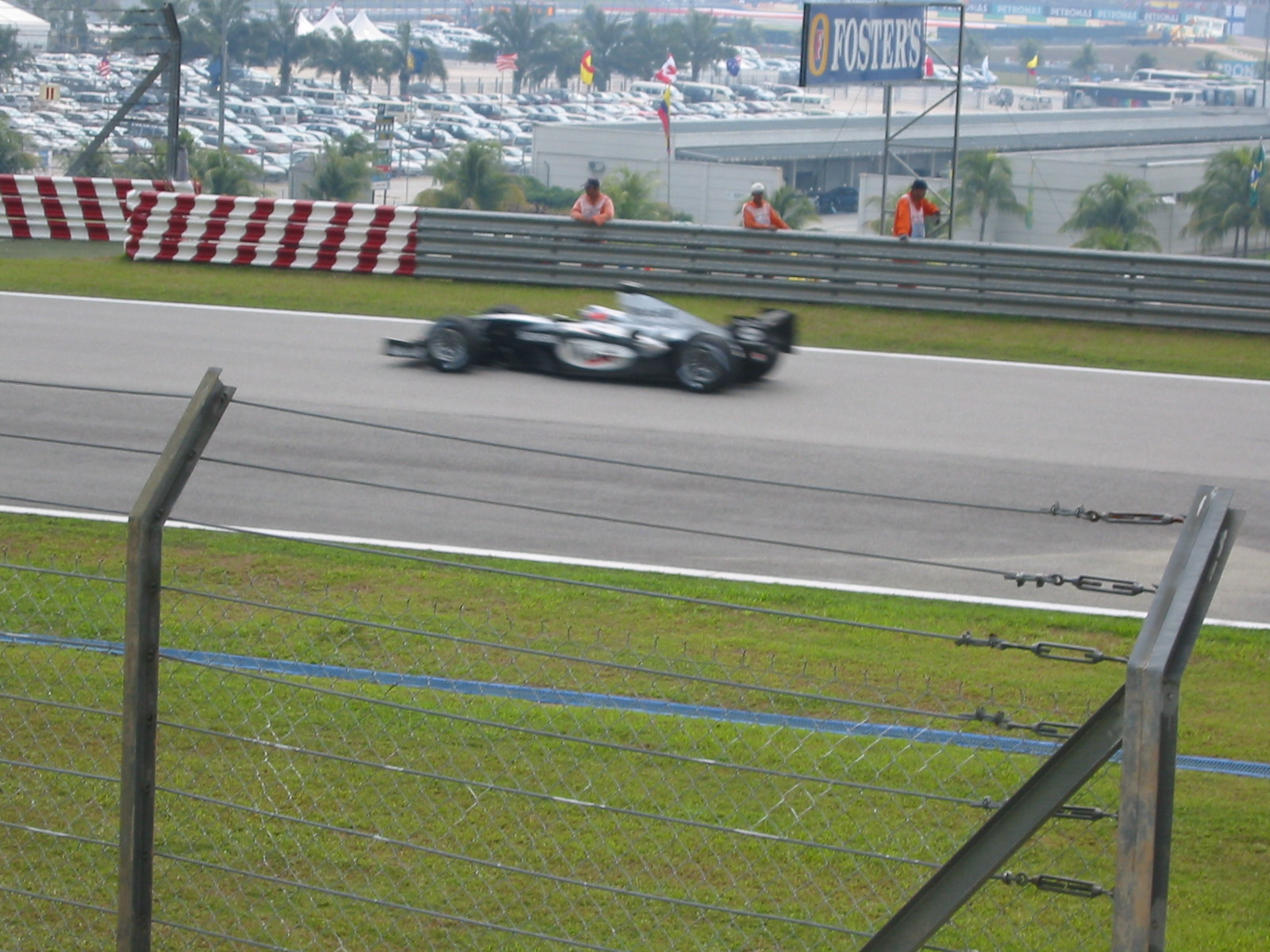 Kimi Raikkonen